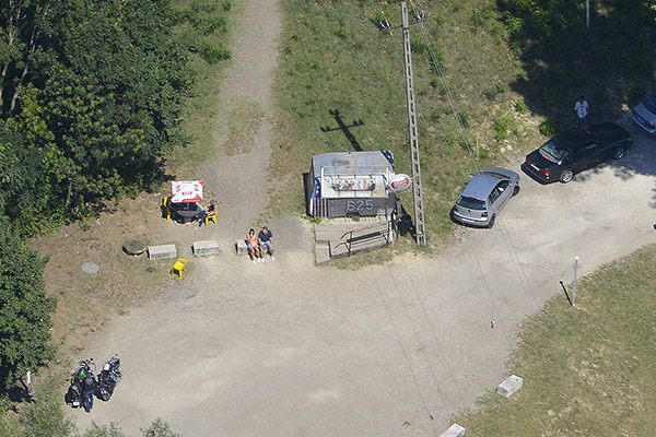 Garancsi-tó. Az Üvegtigris forgatási helyszíne légifotón